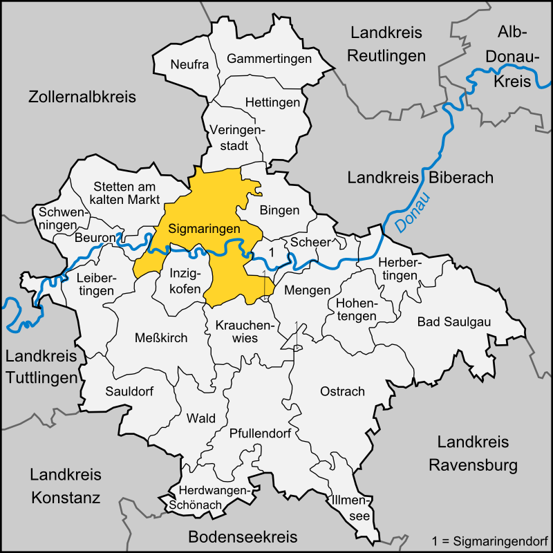 Karte der Stadt Sigmaringen im Landkreis Sigmaringen